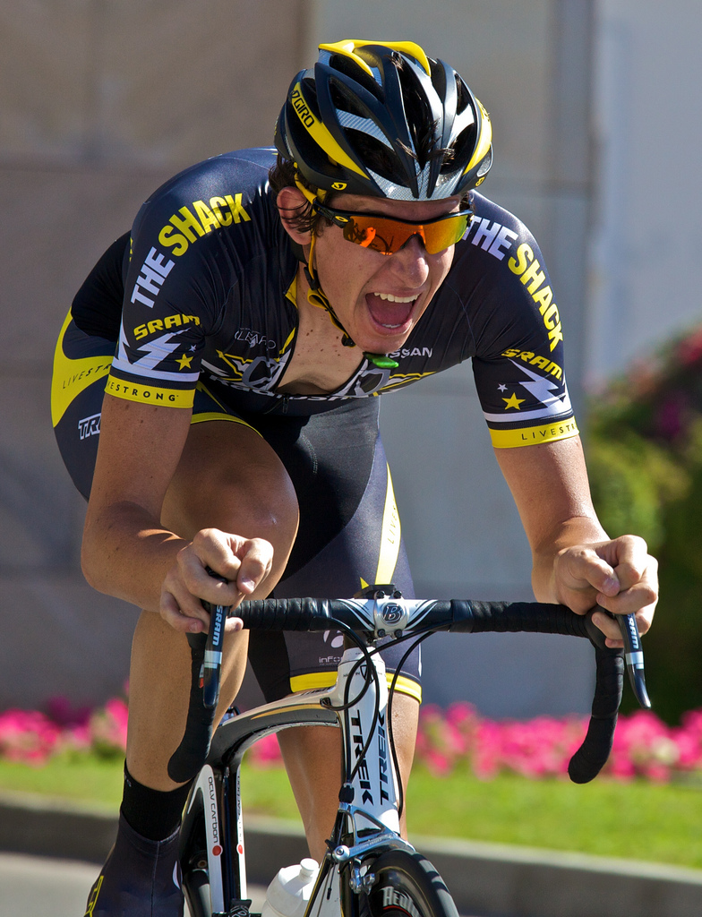 Digging Deep : Tour d'Oman 2010